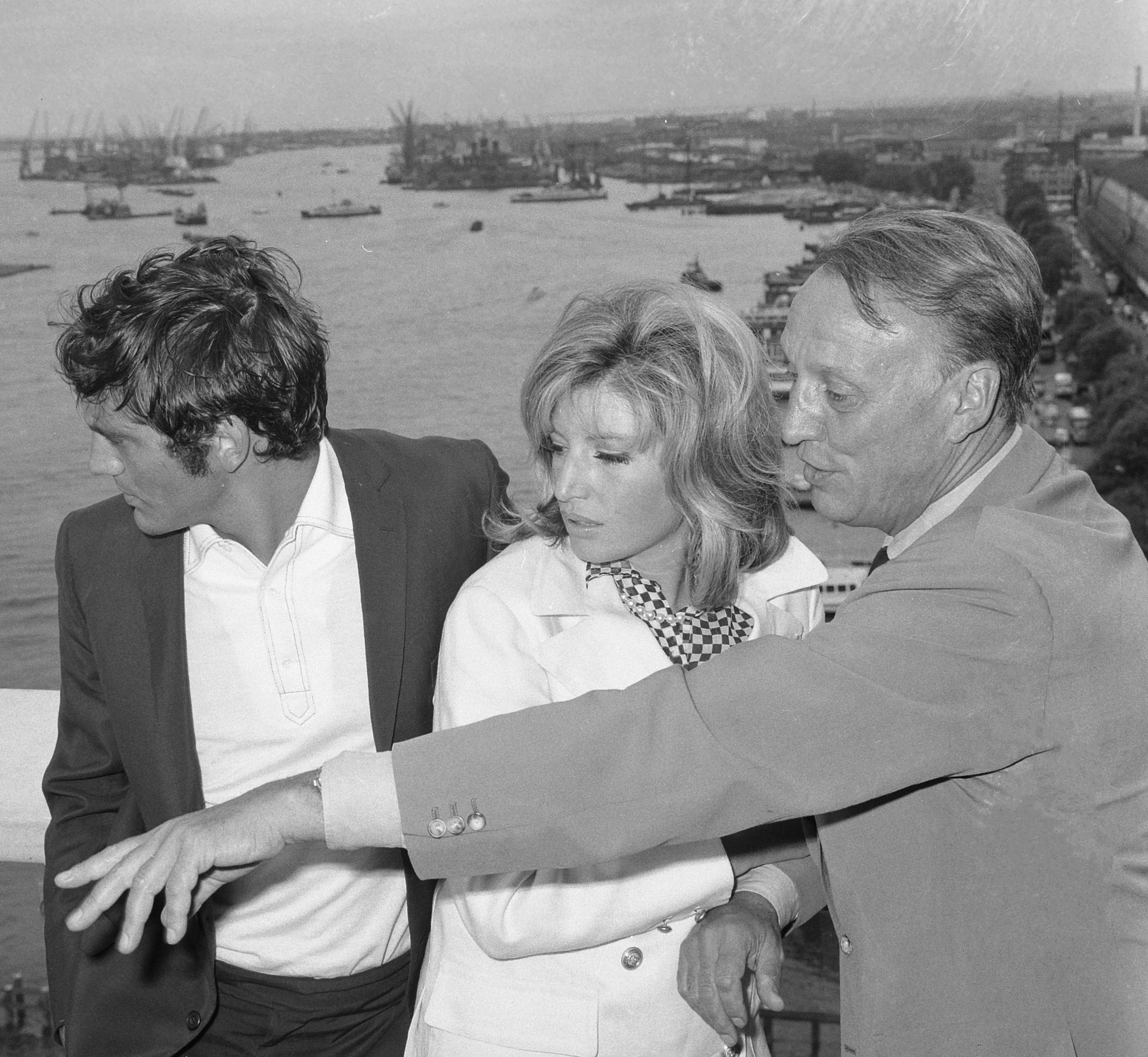 "Modesty Blaise" film van Amerikaan Joseph Losey. Filmopnamen te Amsterdam. Monica Vitti te midden van tegenspeler Terence Stamp en regisseur Joseph Losey